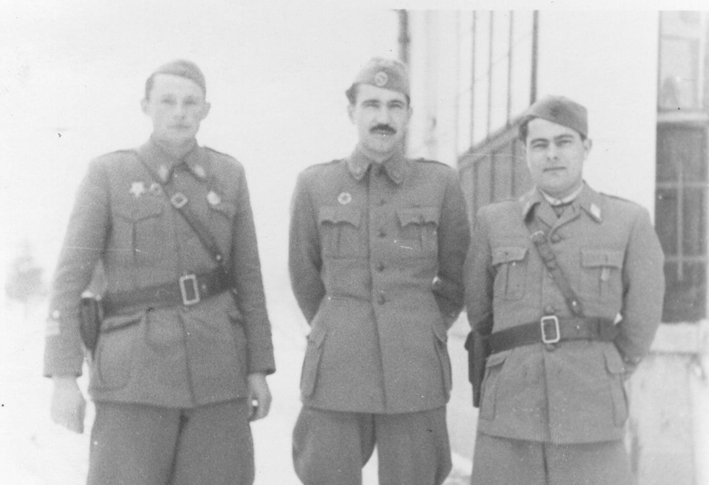 Srpskohrvatski / српскохрватски: Stevo Rauš (komandant 1. krajiške brigade), Slavko Rodić (komandant 5. korpusa) i Nikola Karanović (komandant 3. krajiške brigade) u Jajcu, 1944.